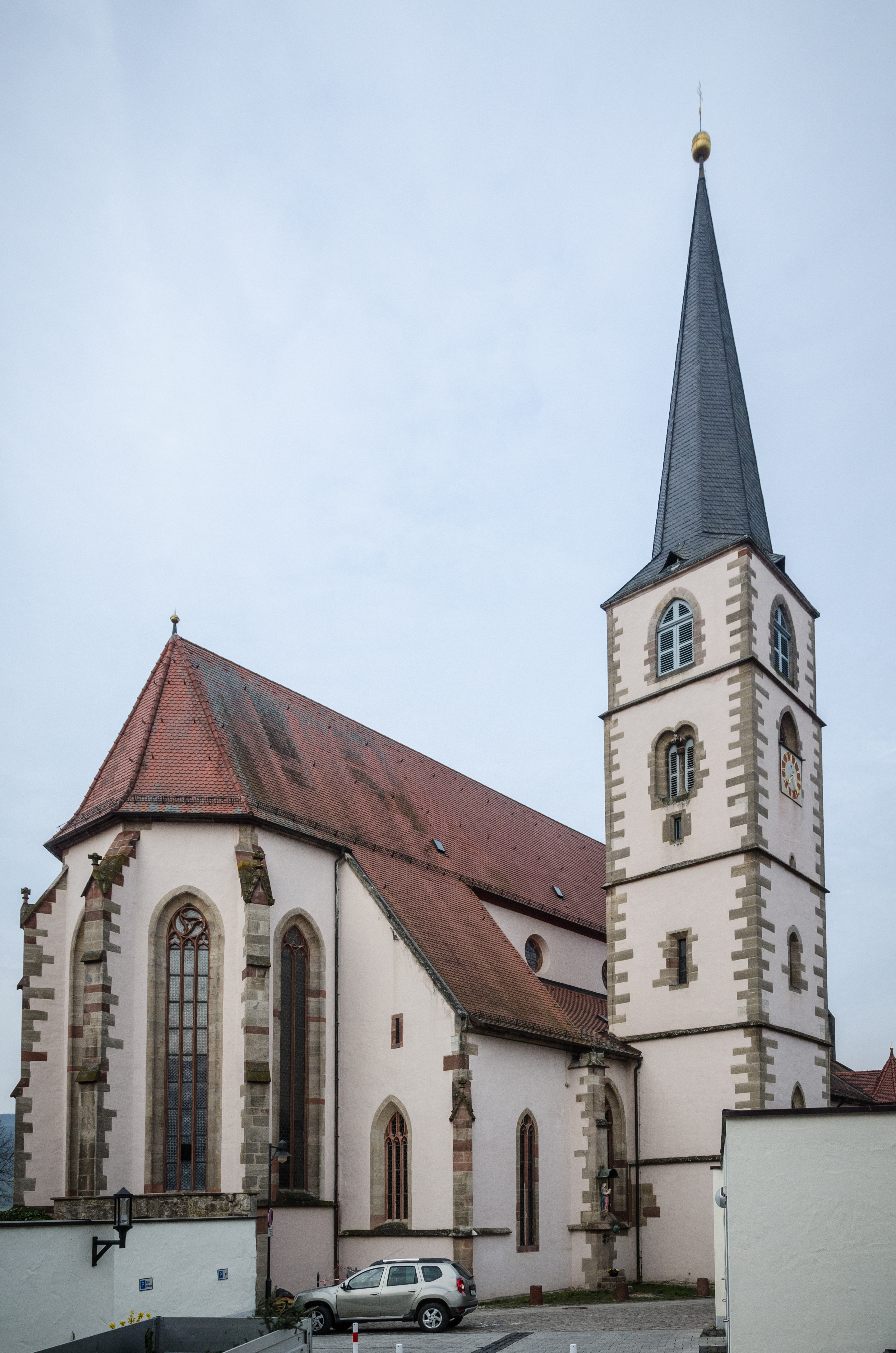 Hammelburg, Pfarrkirche St. Johannes der Täufer